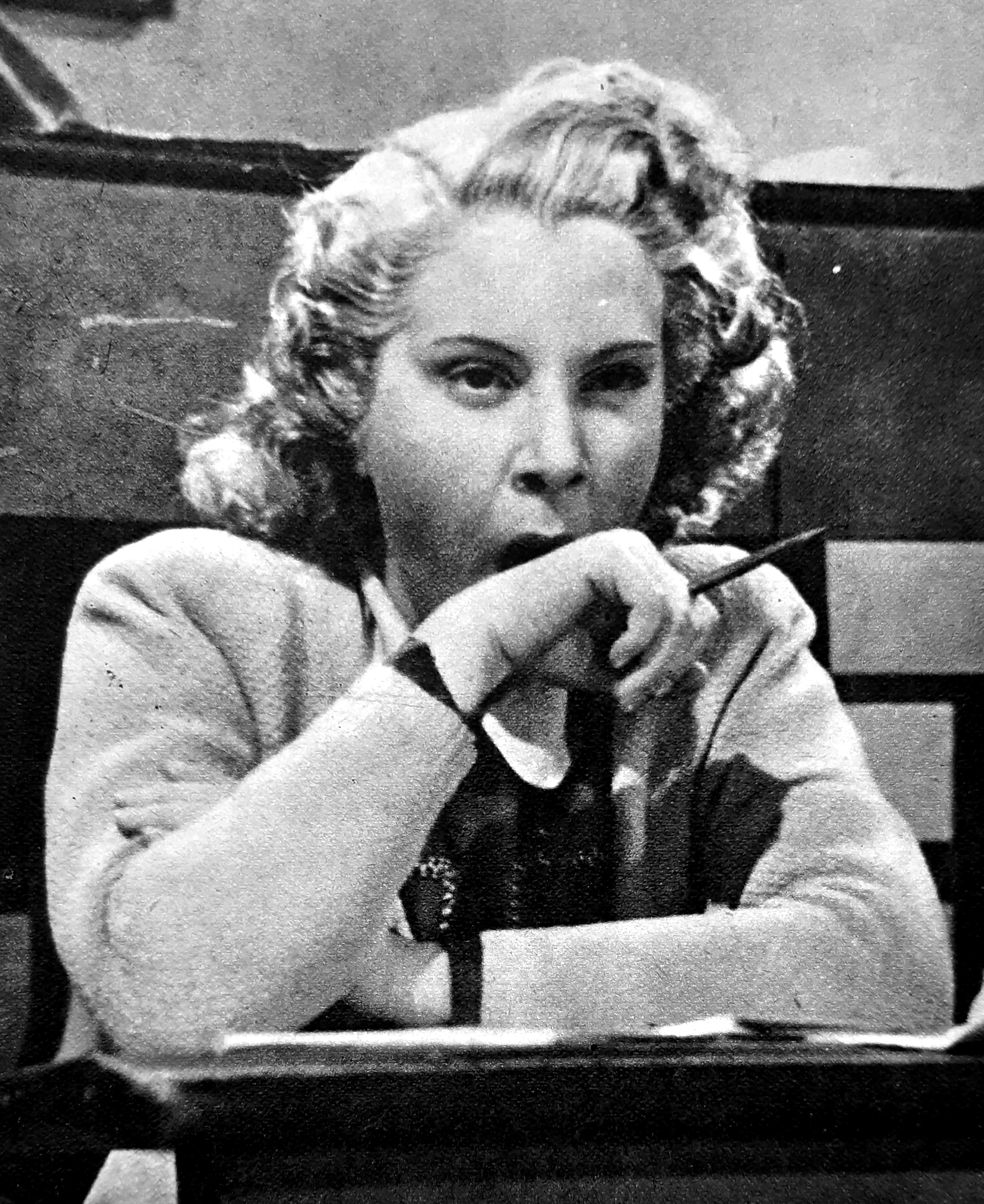 L'attrice italiana Lilia Silvi nel 1943